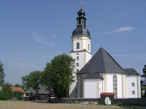 Pretzschendorfer Kirche